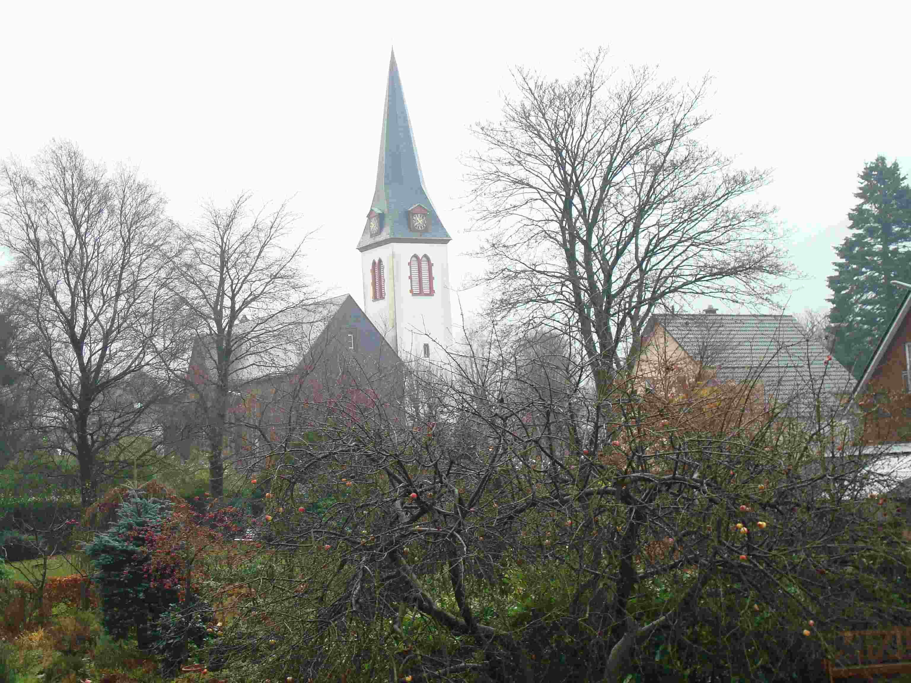 Im Vordergrung sind die Gärten mit Obstbäumen zu sehen und im Hintergrund die Hünger Kirche